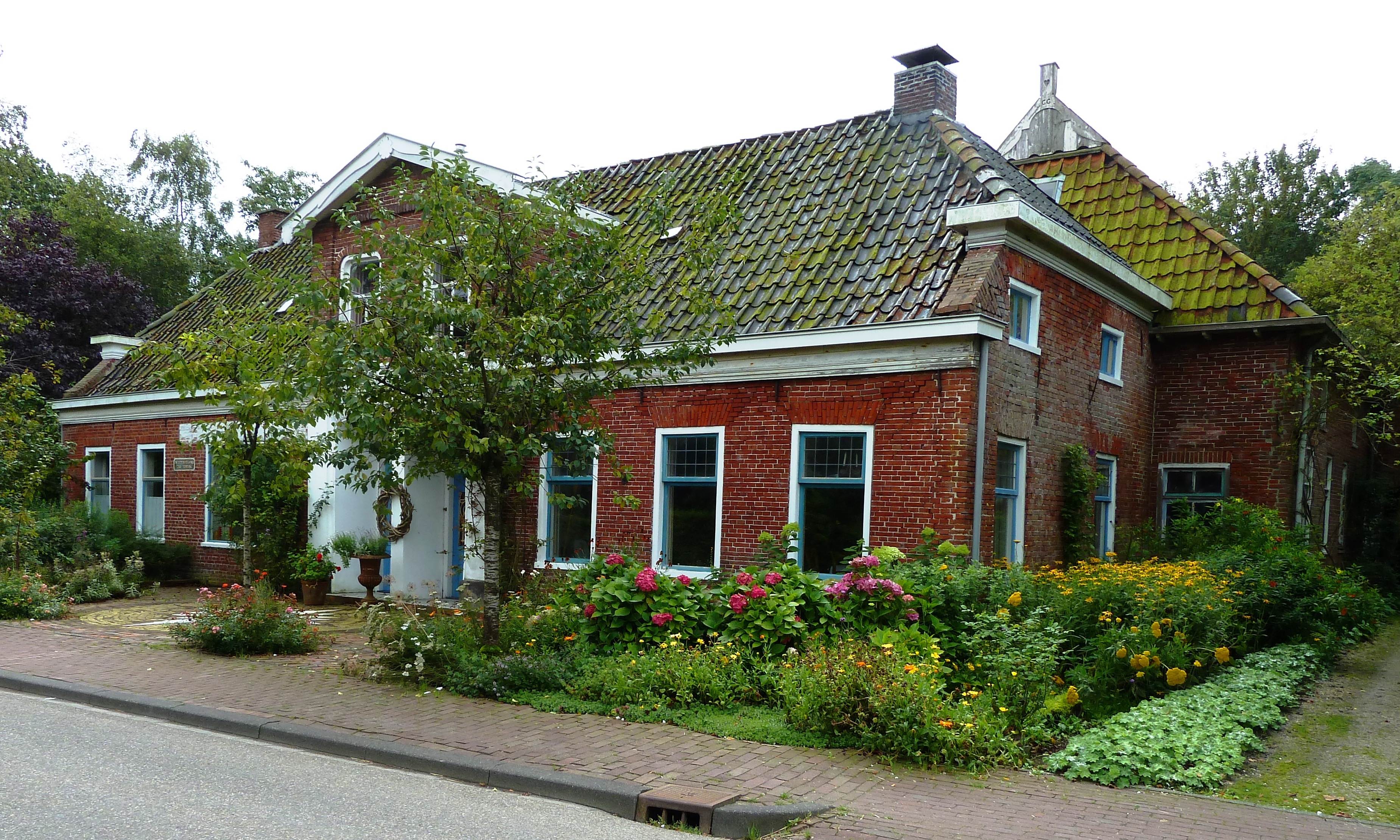 Oude slijterij-café van Westernieland (zie ook foto uit 1978).